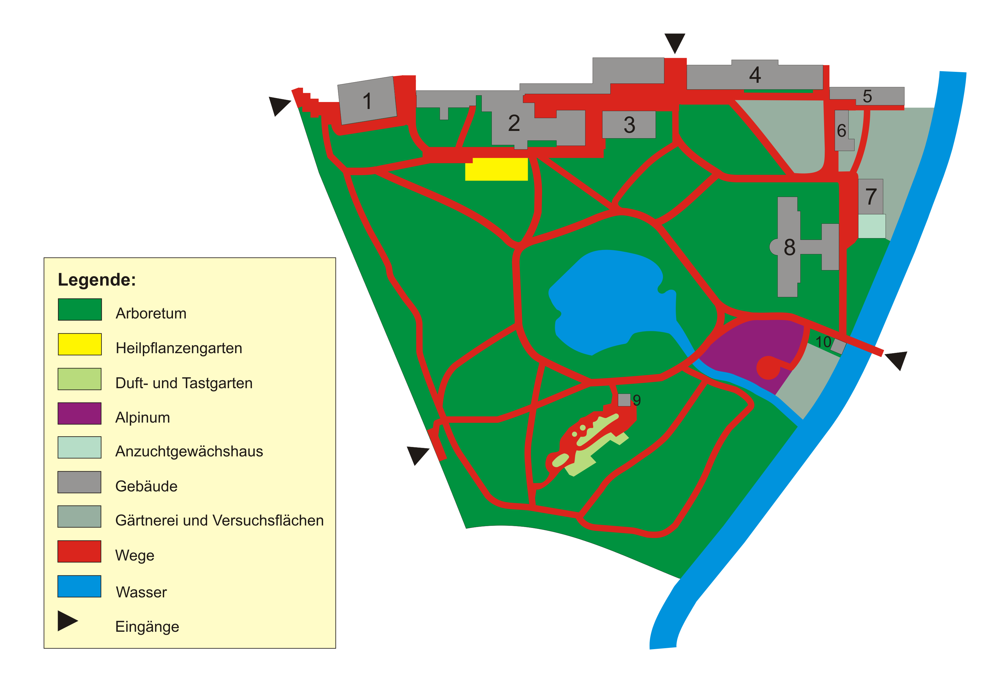 Alter Botanischer Garten Marburg (Karte im Jahr 2008) Gebäude: Ehemalige Frauen-Poliklinik Institut für pharmazeutische Biologie und Baracken Labors Schwesternwohnheim Gästehaus der Philipps-Universität Garagen Gärtnerei Musizierhaus der Philipps-Universität Holzunterstand Pumpenhäuschen